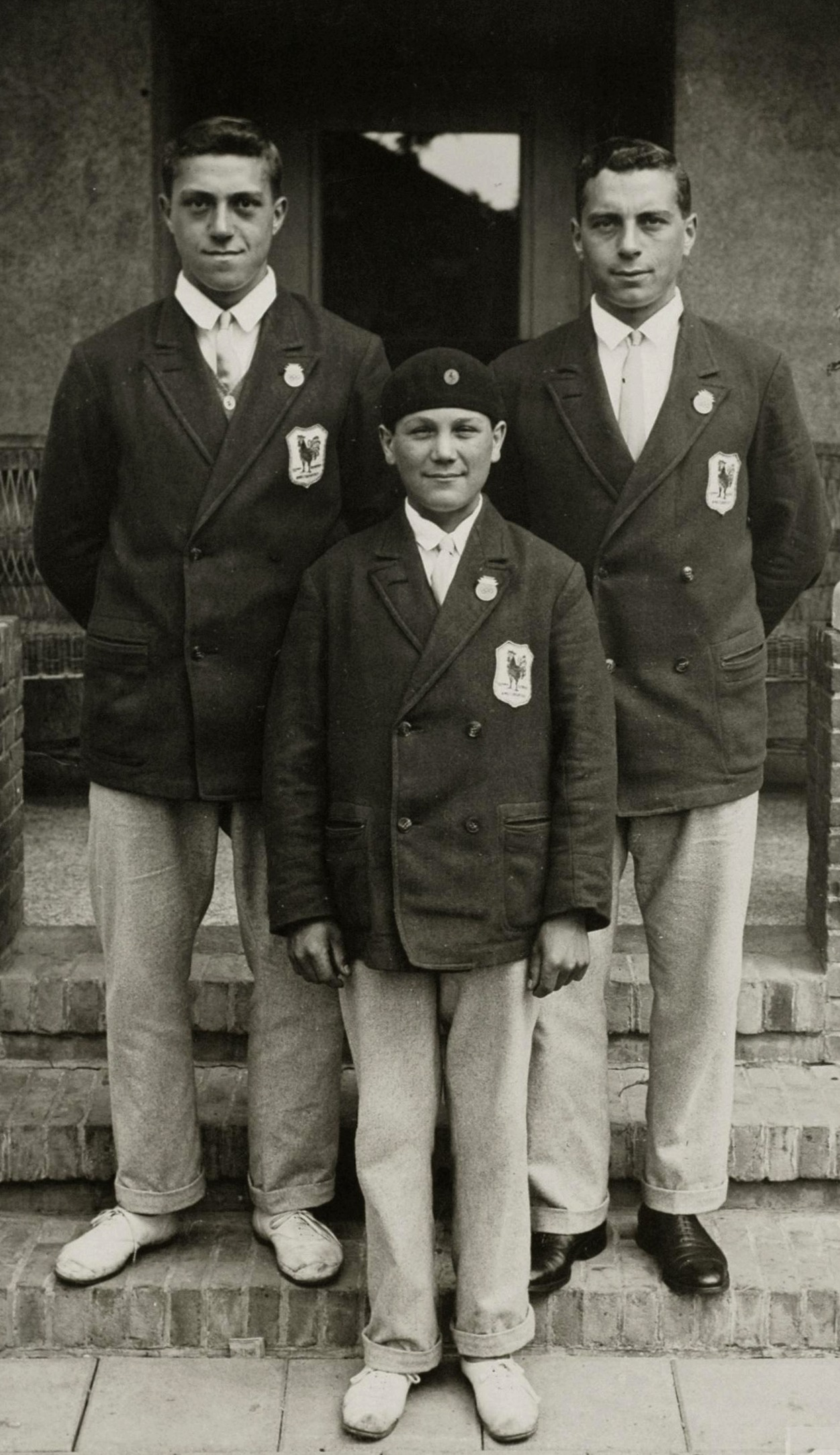 Olympische Spelen Amsterdam, Nederland, 1928: Roeien, twee met stuurman. Het Franse team poseert: A. Marcelle, E. Marcelle en H. Préaux